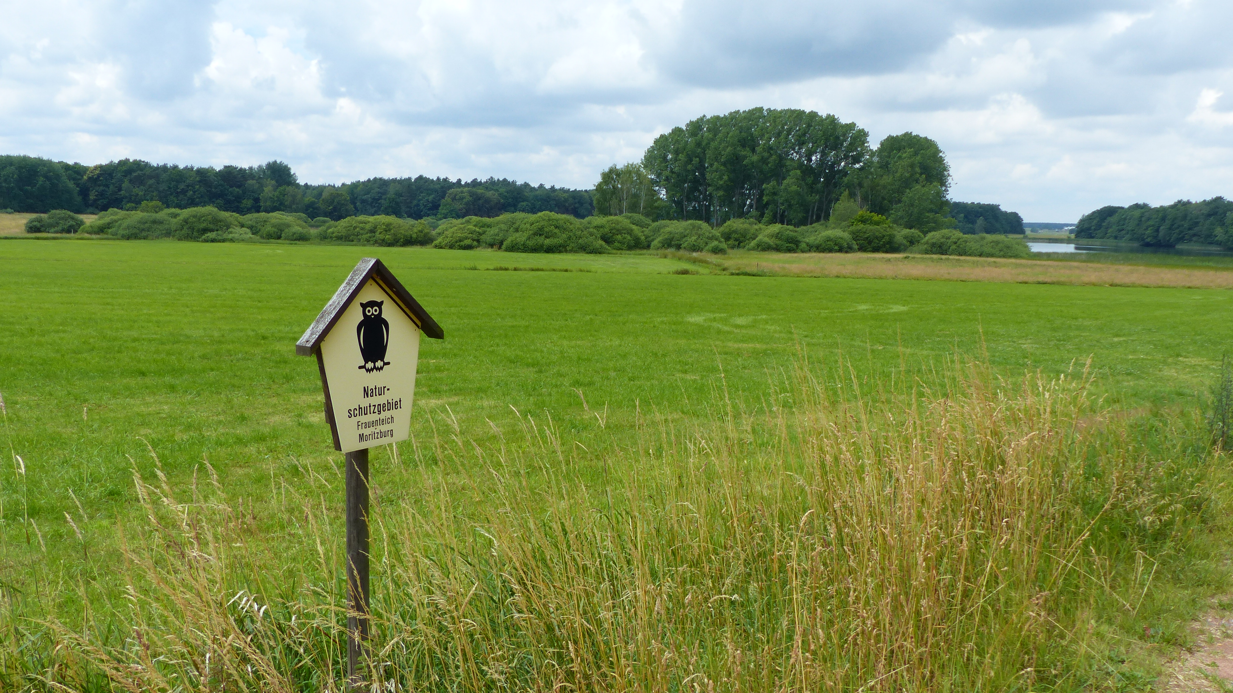 Naturschutzgebiet Frauenteich Moritzburg